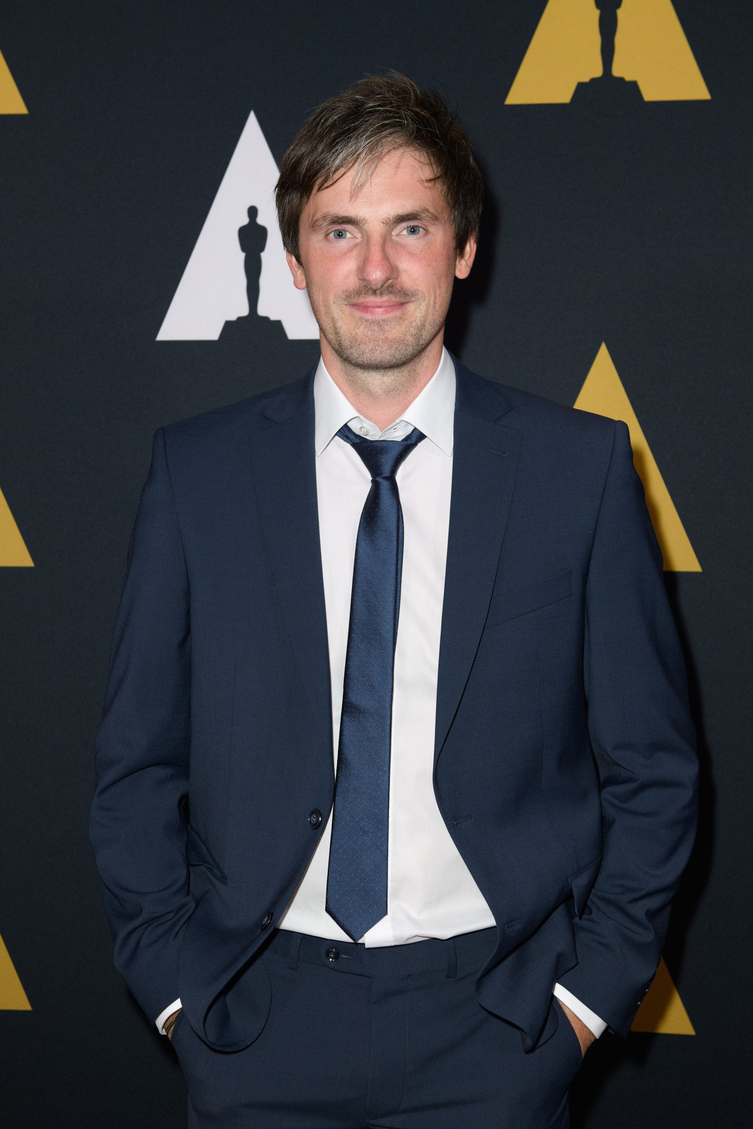 Felix Ahrens bei der Verleihung der 43rd Annual Student Academy Awards